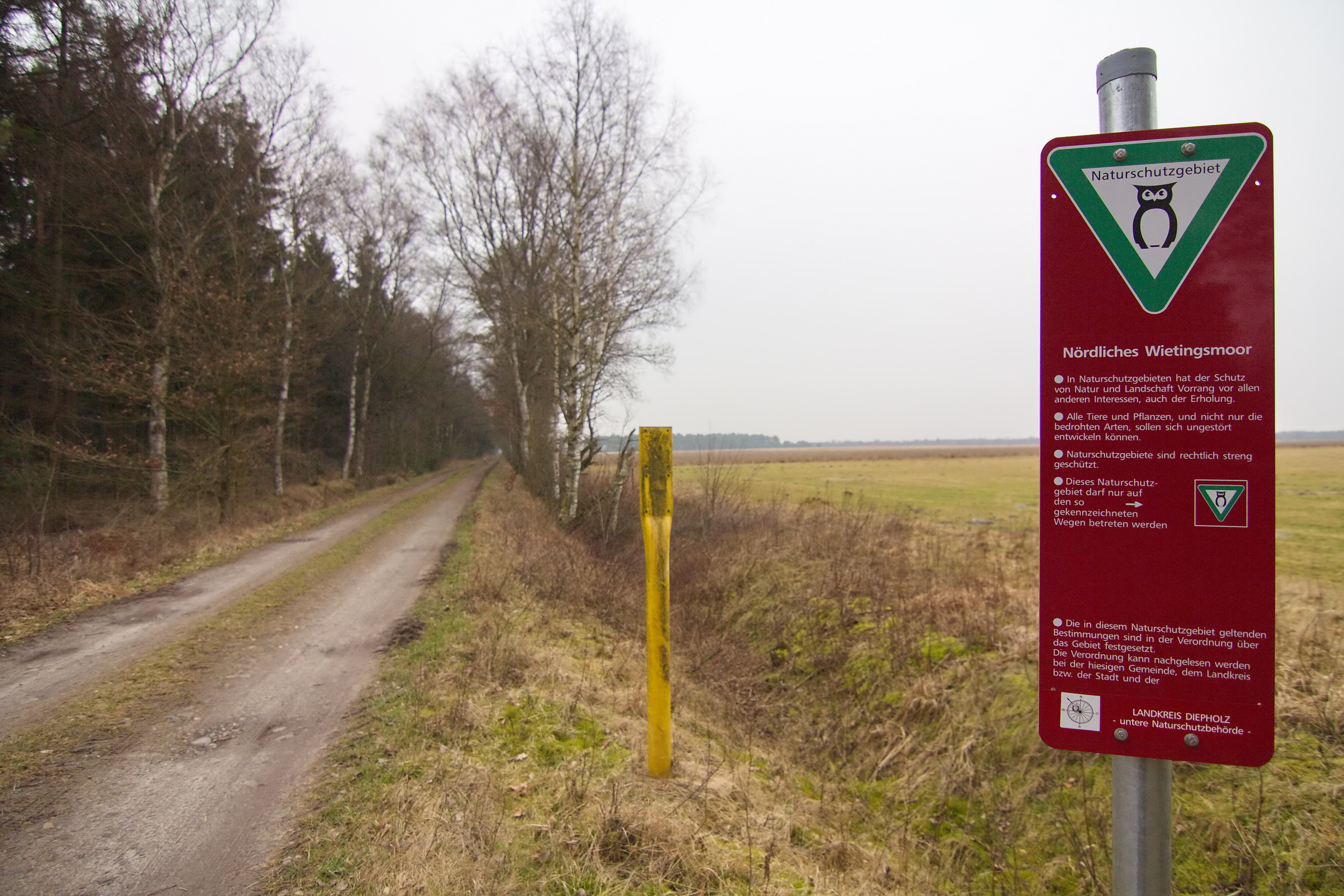 NSG-Schild am Südrand des Naturschutzgebiets Nördliches Wietingsmoor (rechts des Weges) im Landkreis Diepholz, Niedersachsen, Deutschland.